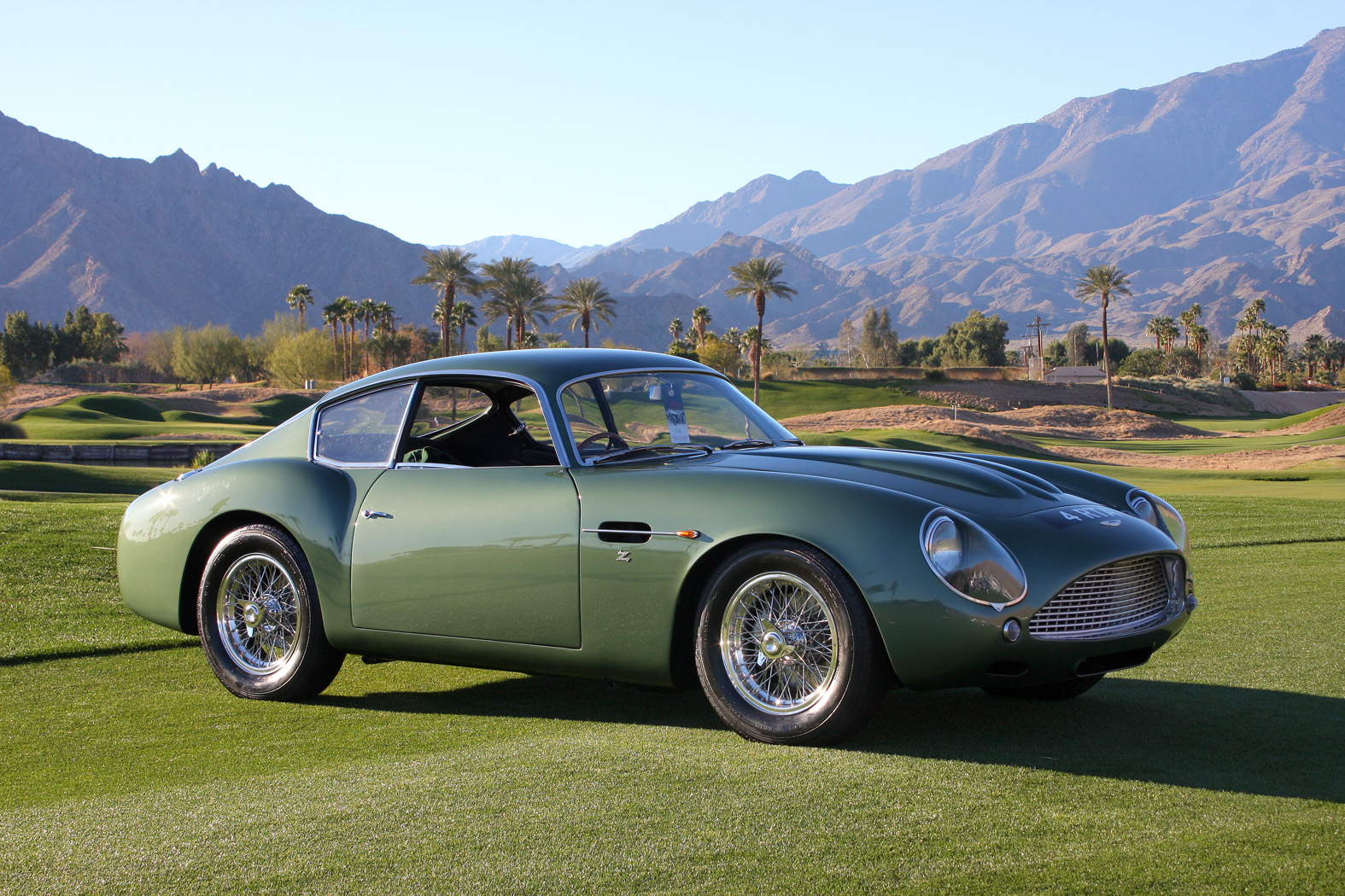 2011 Desert Classic, La Quinta, CA